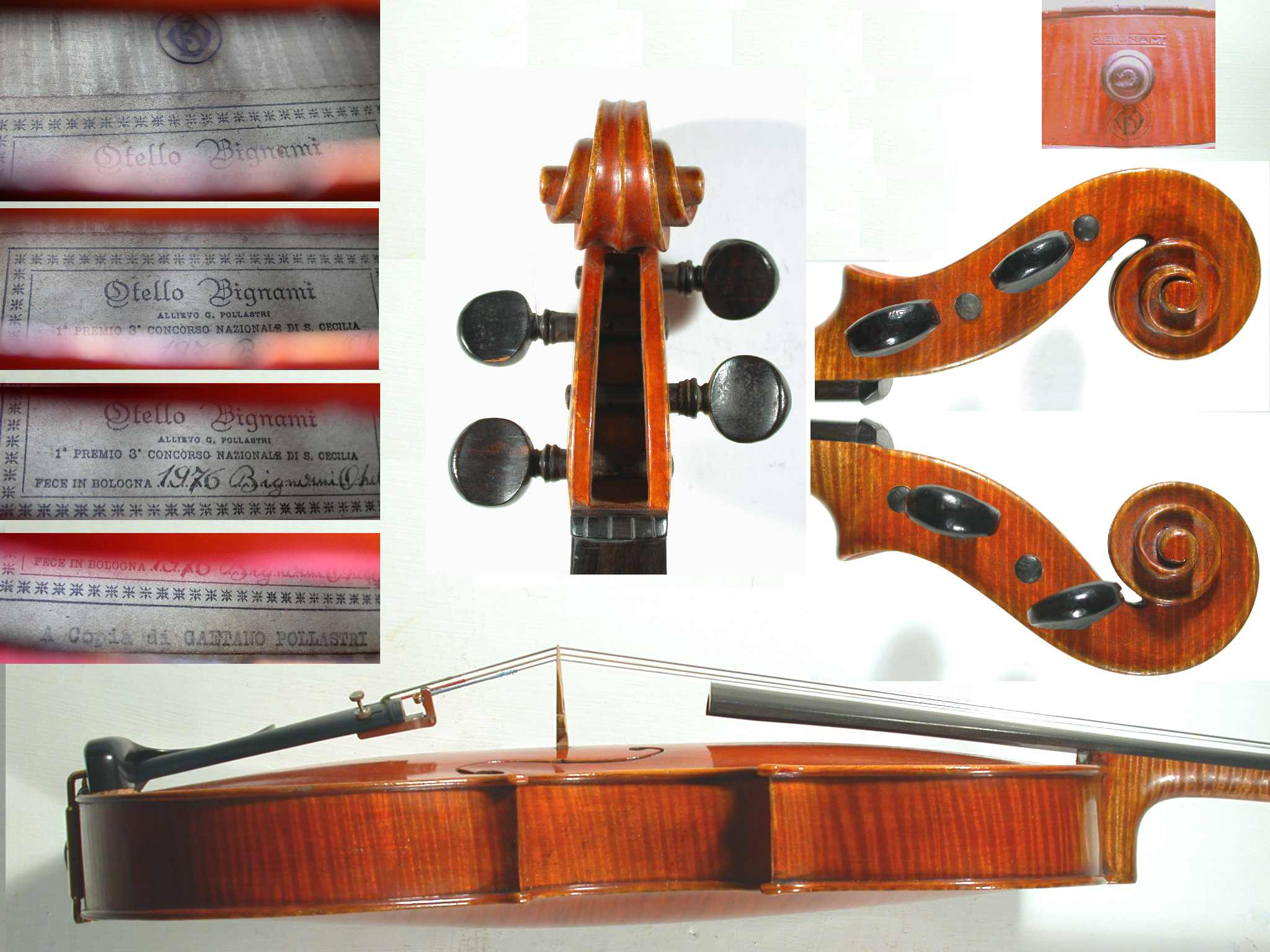 Otello Bignami viola 1976 (scroll, label & brandings)